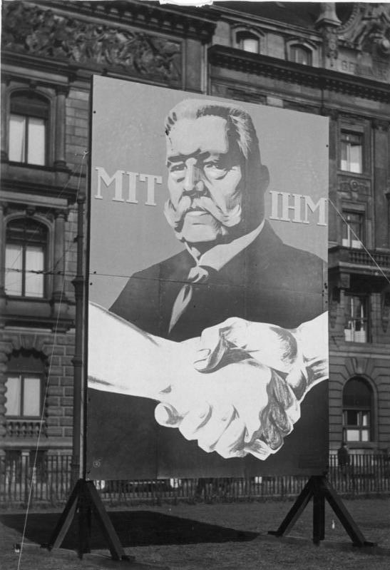 Berlin, Wahlplakat für Hindenburg ADN-ZB-Archiv Reichspräsidenten 1932 Im März 1932 war die Amtszeit des Reichspräsidenten abgelaufen. Der Wahlkampf tobte erbittert. Die Deutschnationalen stellten Hindenburg als Kandidaten auf. Richtig verkündeten die Kommunisten:"Wer Hindenburg wählt, wählt Hitler! Wer Hitler wählt, wählt den Krieg!" UBz:Wahlplakat für Hindenburg [in Berlin] Scherl Bilderdienst